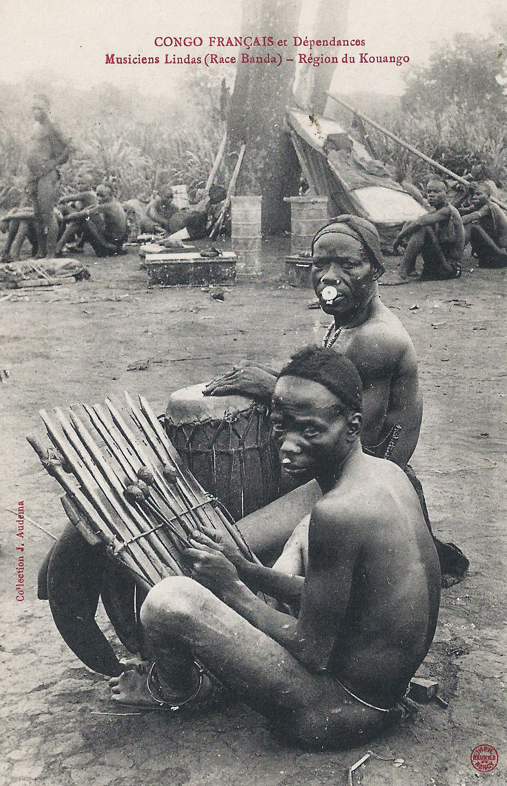 Musiciens Lindas (Race Banda). Région du Kouango. Collection J. Audema. Phot. A.B. & Cie, Nancy [Albert Bergeret] Congo Français et dépendances